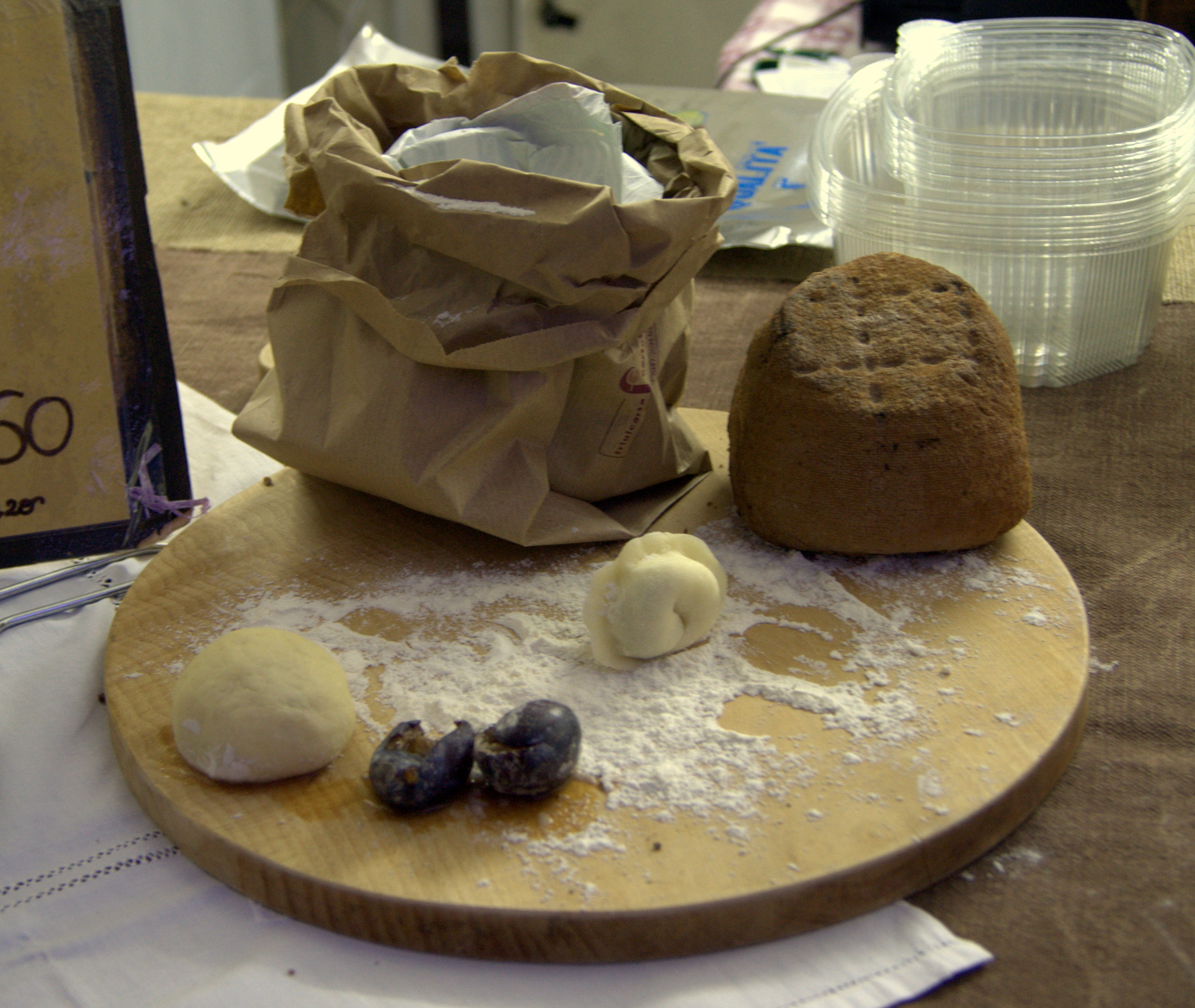 Cjalsons, ricotta e uno gnocco di susina